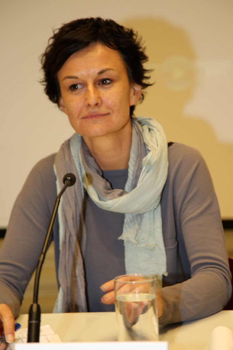 Cornelia Vospernik-2379